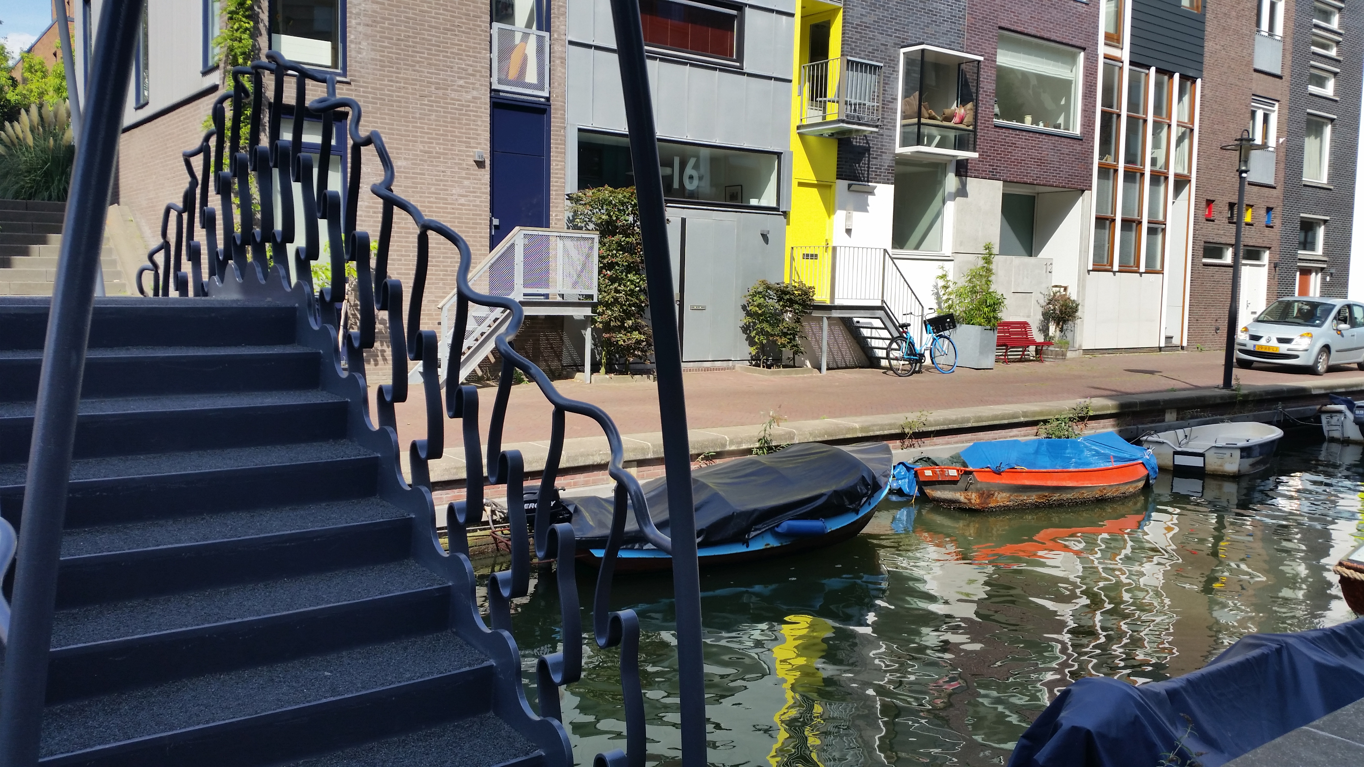 Noordelijke leuning van Brug 1988, Light